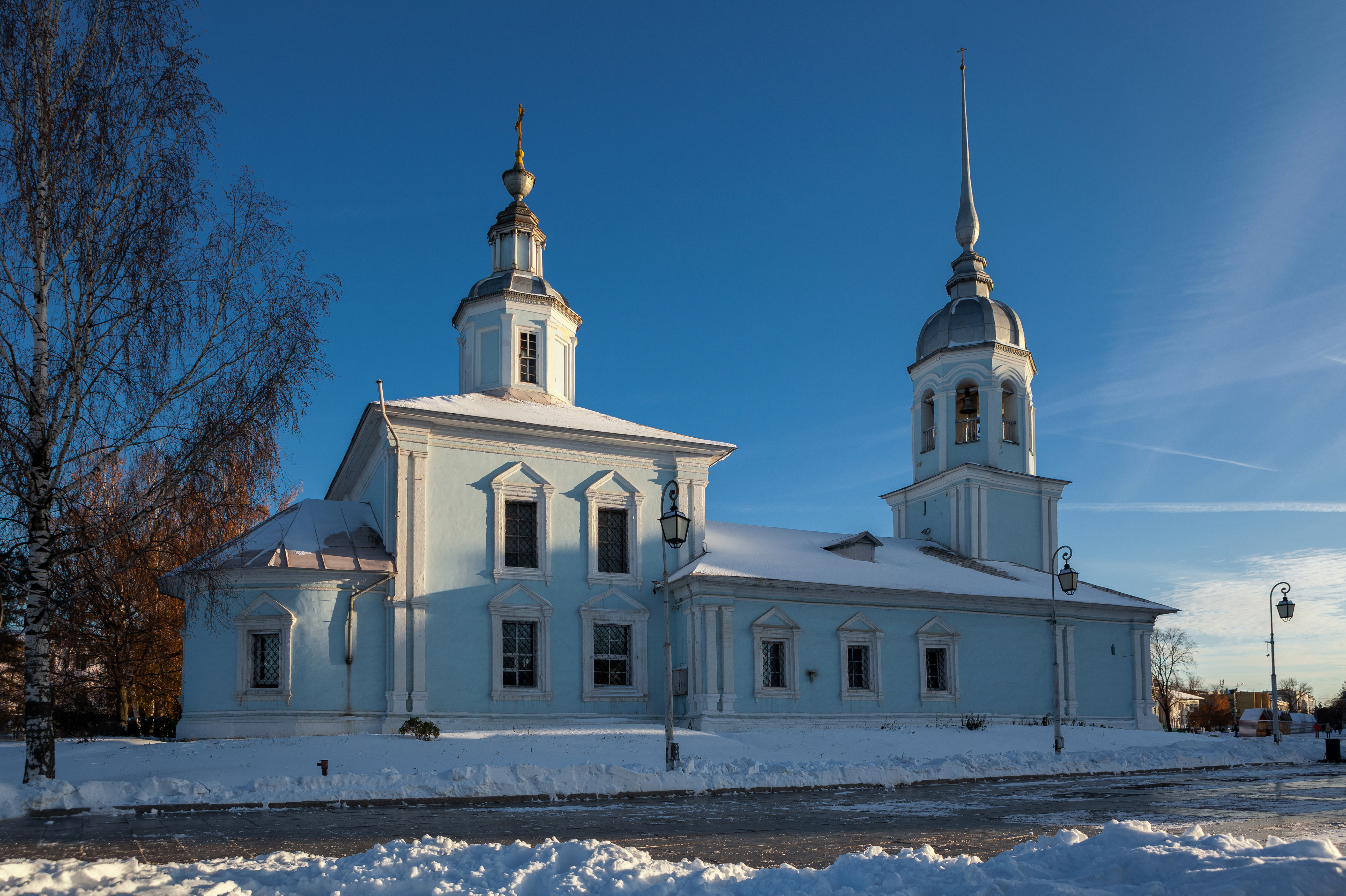 Церковь Александра Невского (Вологодская область, Вологда, улица Сергея Орлова)